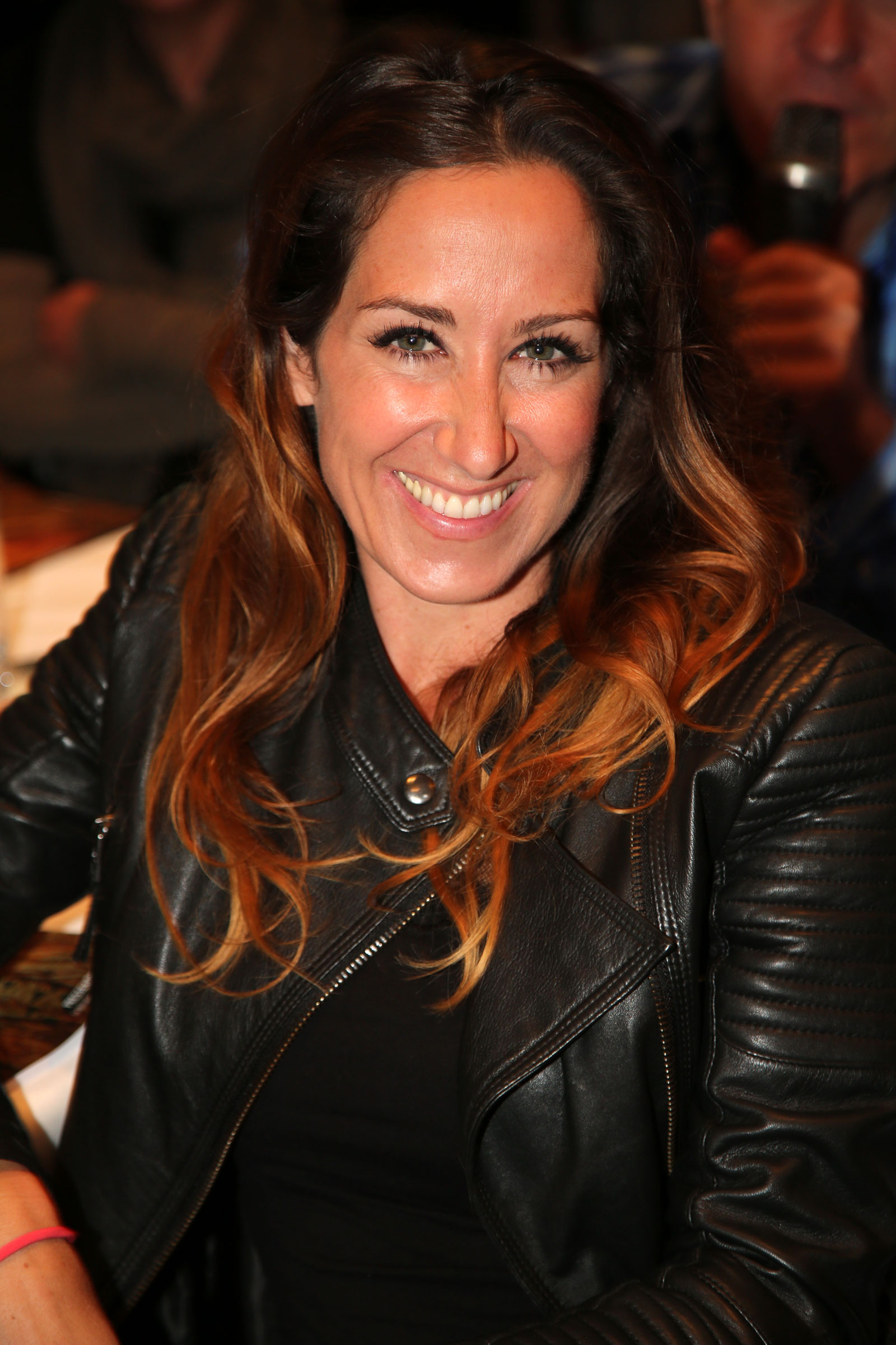 Bellowitsch_Kati-3600